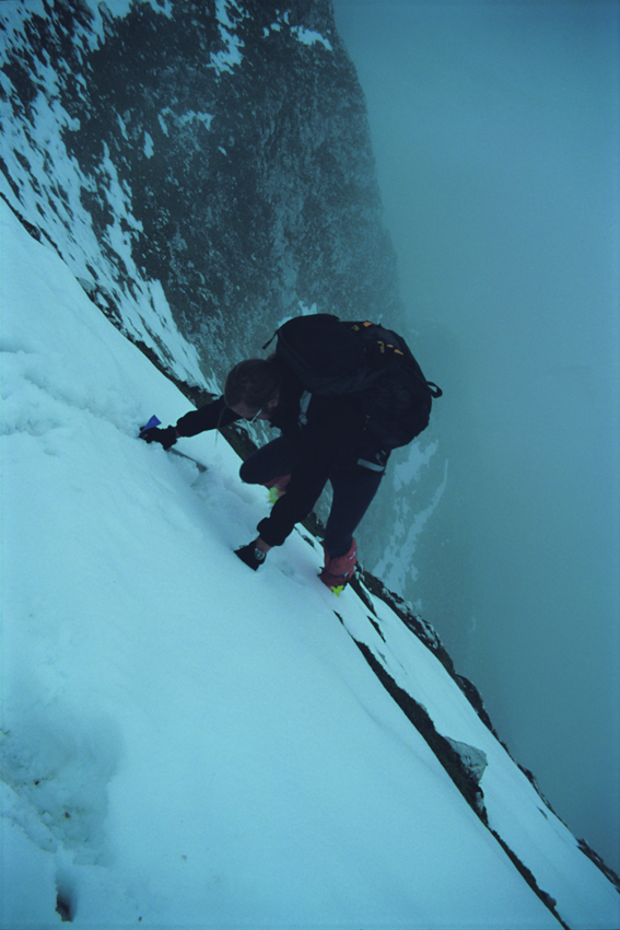 Helmut Ditsch auf der Vorderen Brandjochspitze/Tirol 1997